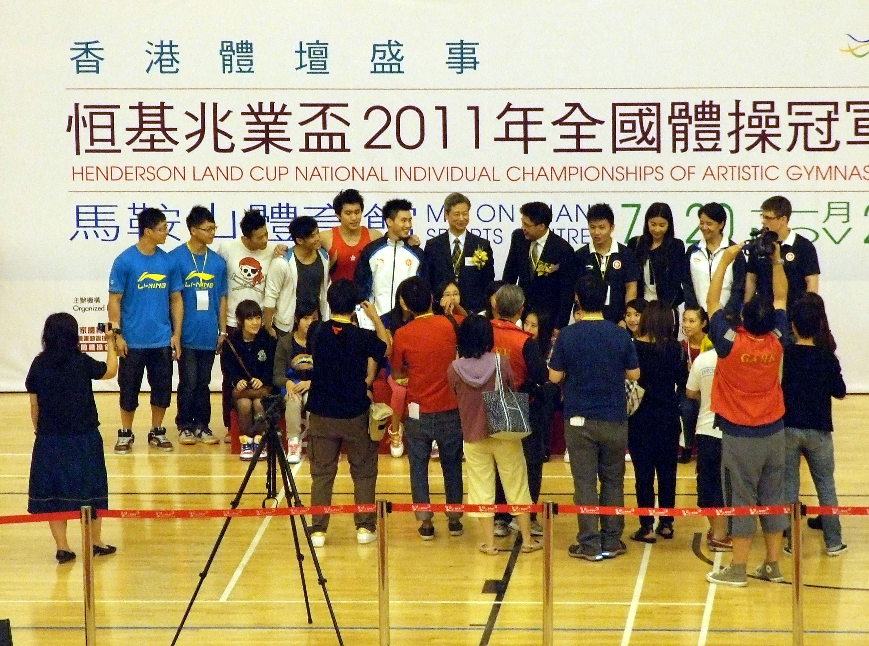 中文（香港）: 恒基兆業盃2011年全國體操冠軍賽陳錦雄、霍啟剛、郭晶晶與港隊成員合照